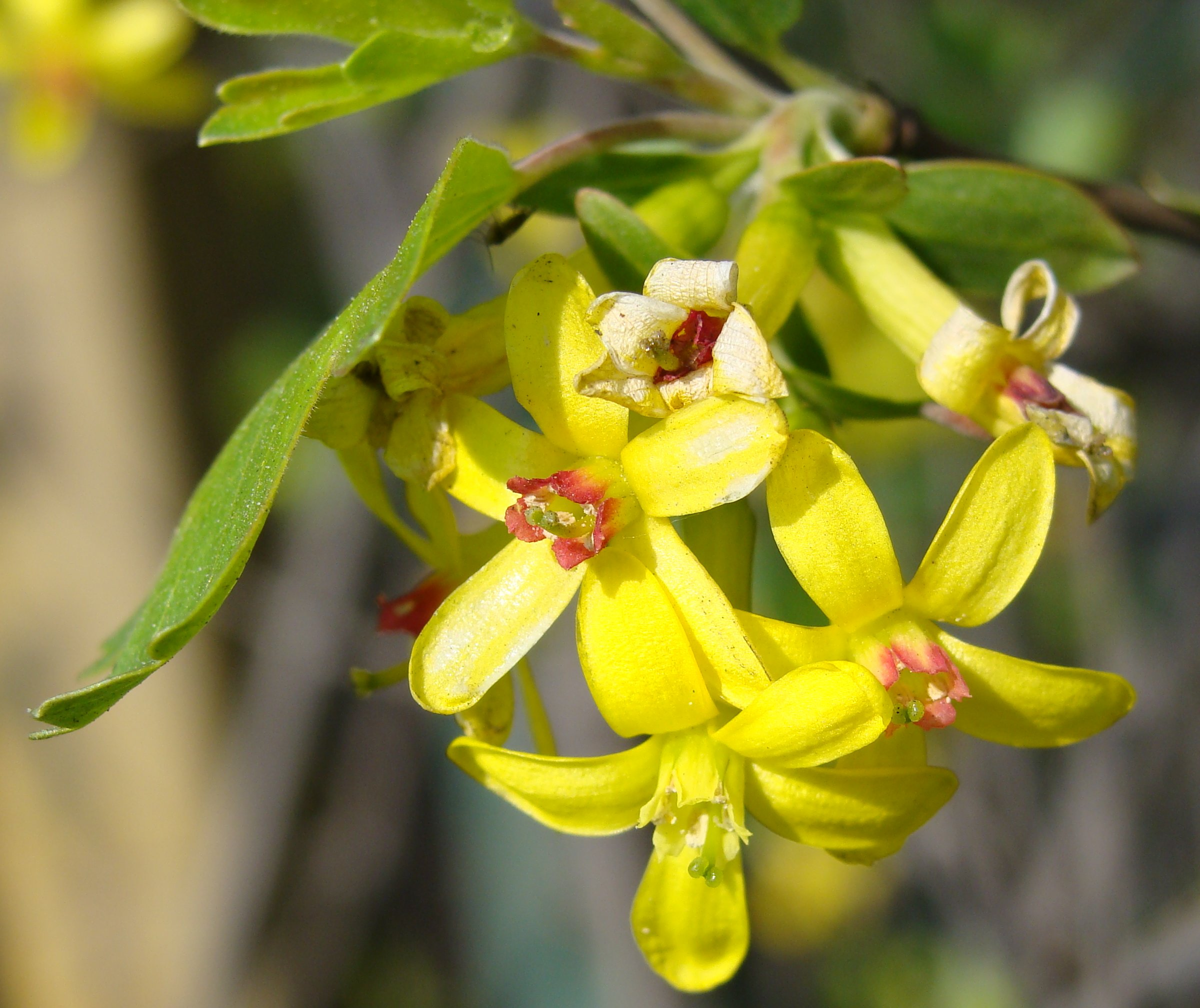 Ribes aureum Porzeczka złota